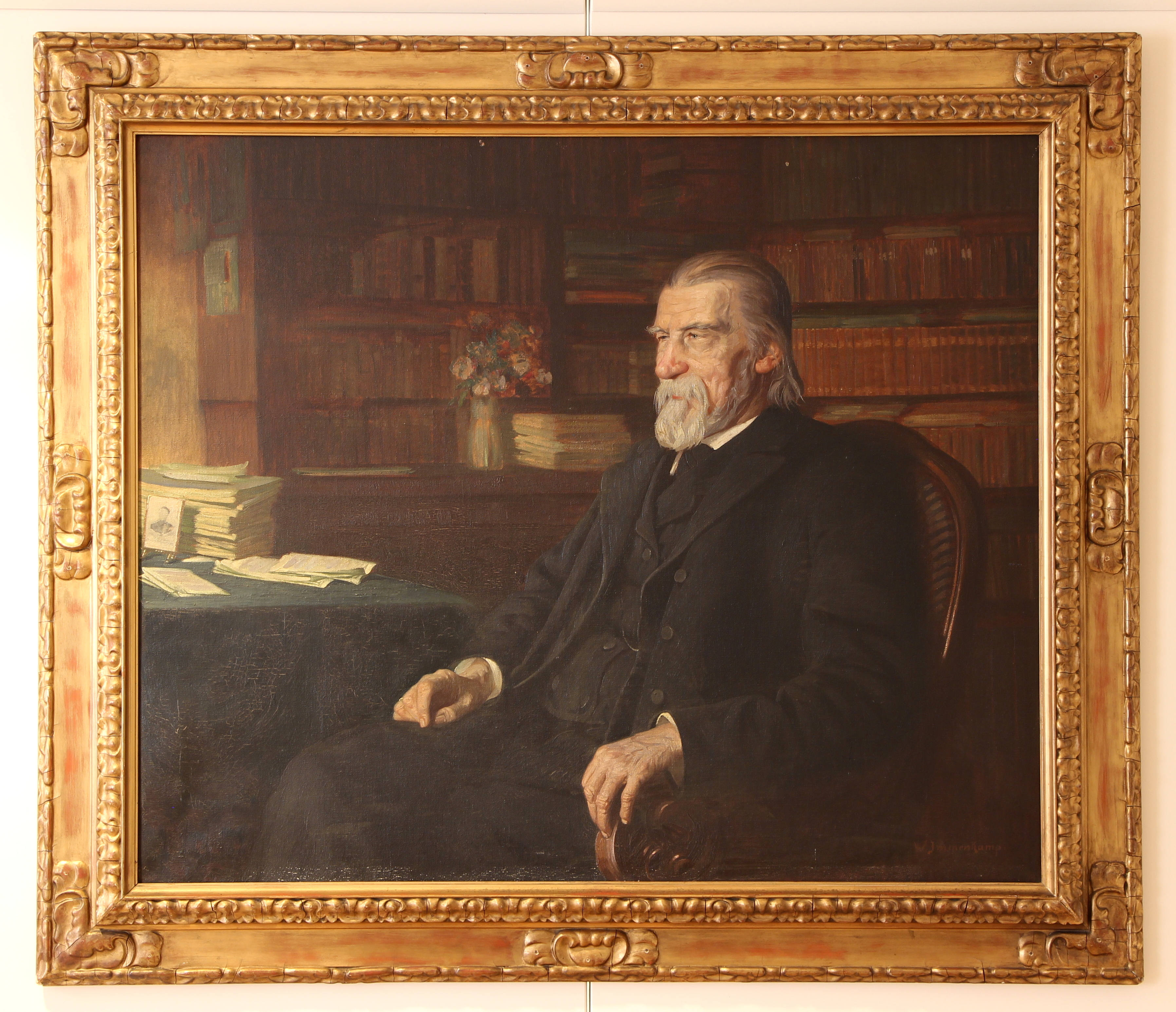 Braunschweigisches Landesmuseum. Wikimedia Deutschland. Juni 2014. Wilhelm Immenkamp: Wilhelm Raabe, 1909. Gemalt in Raabes Arbeitszimmer in der Leonhardstraße.